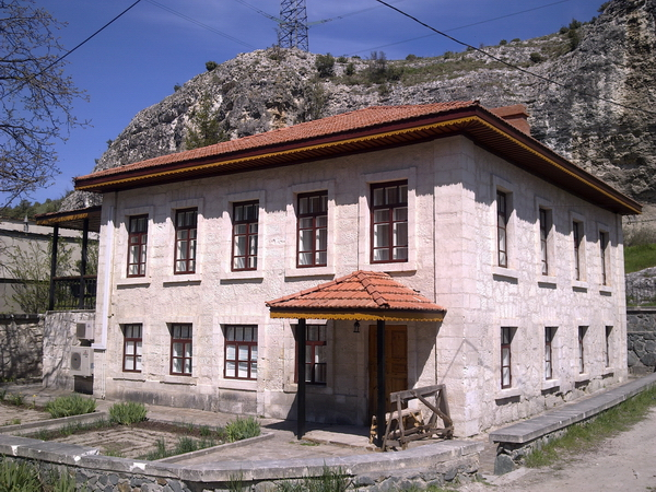 Назва за держреєстром пам'яток: "Будівля колишньої друкарні «Терджиман», в якому працював Ісмаїл-бей Гаспринський"